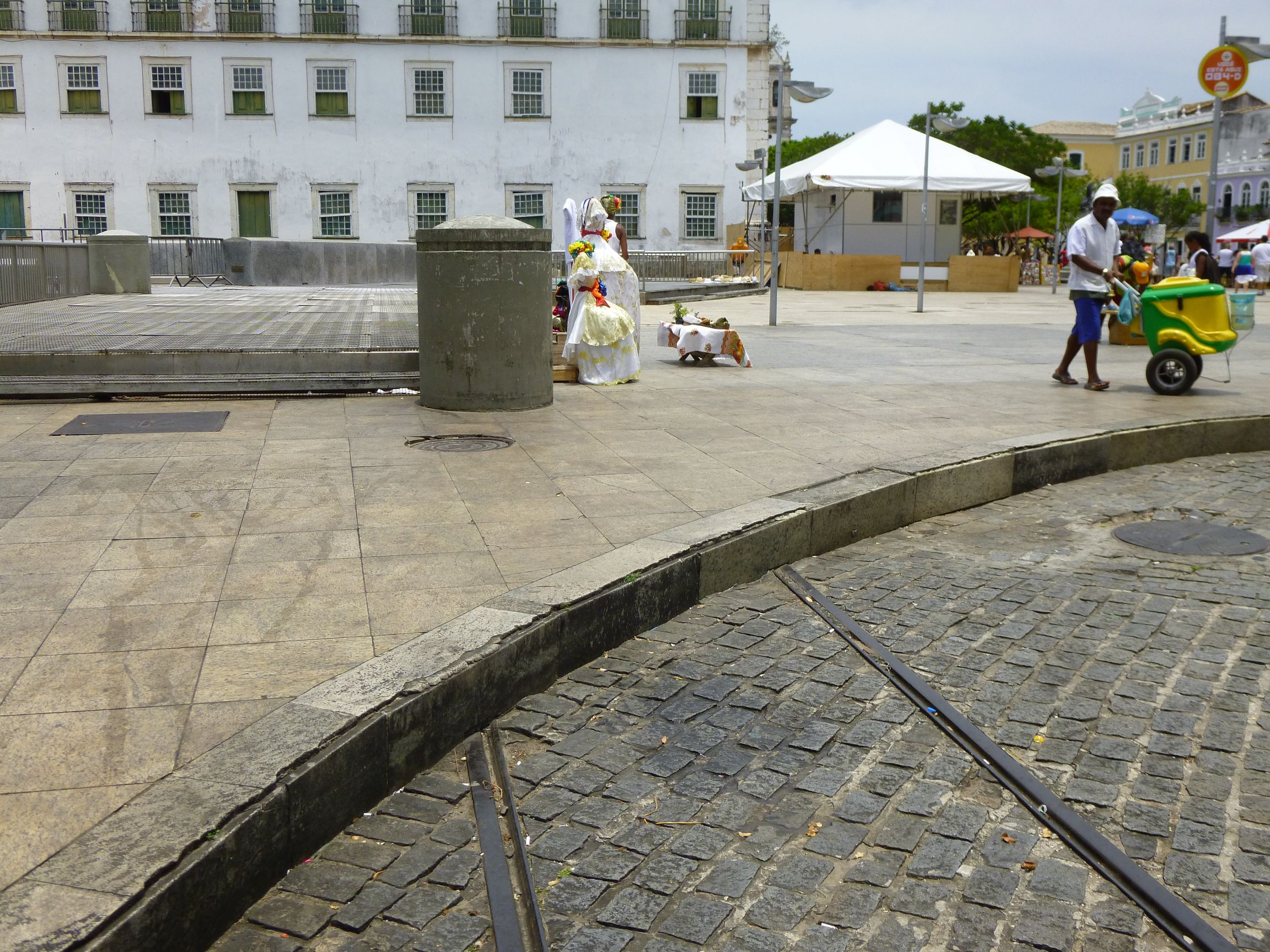 Gleise Richtung Domplatz Salvador Brasilien